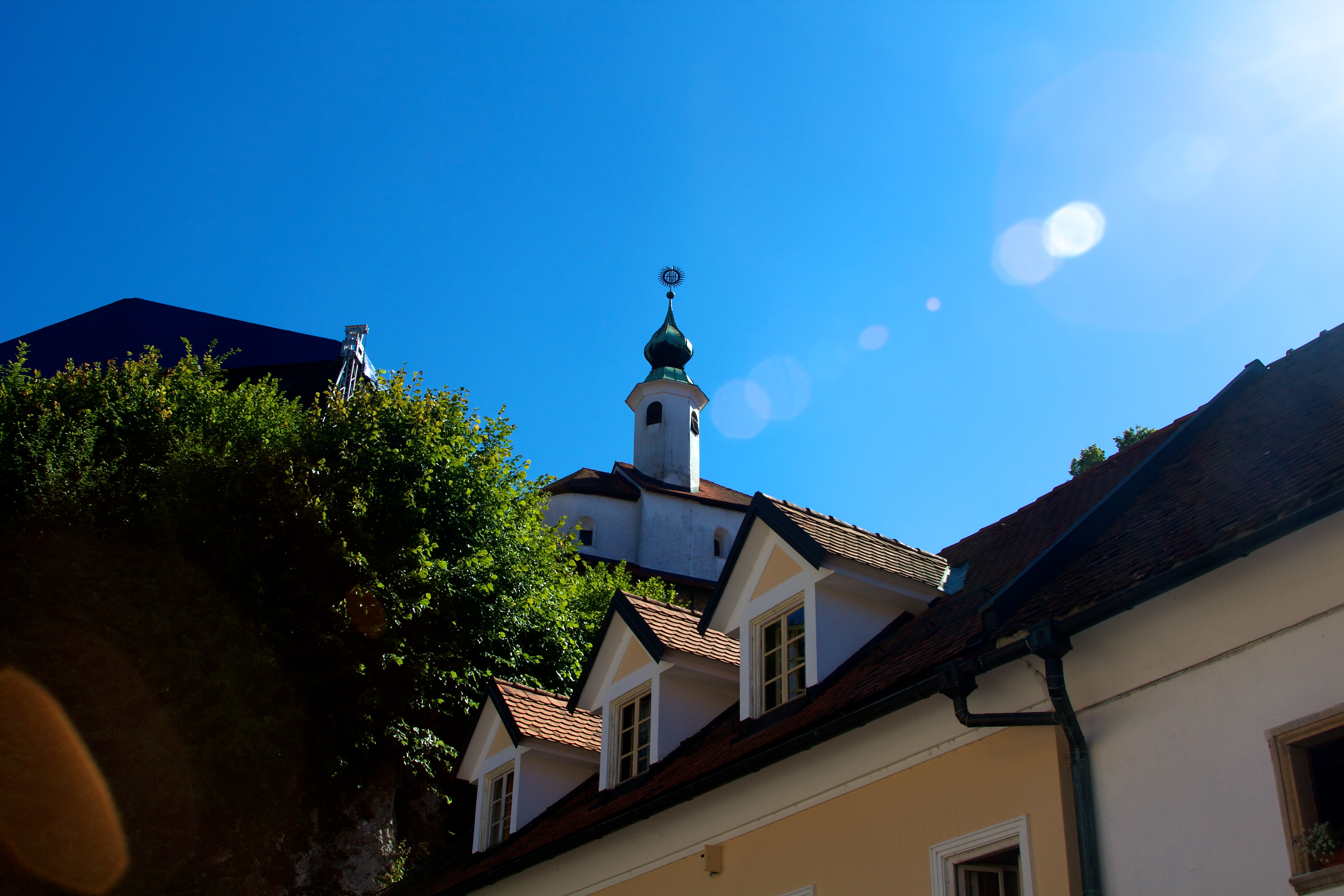 Kamnik 007